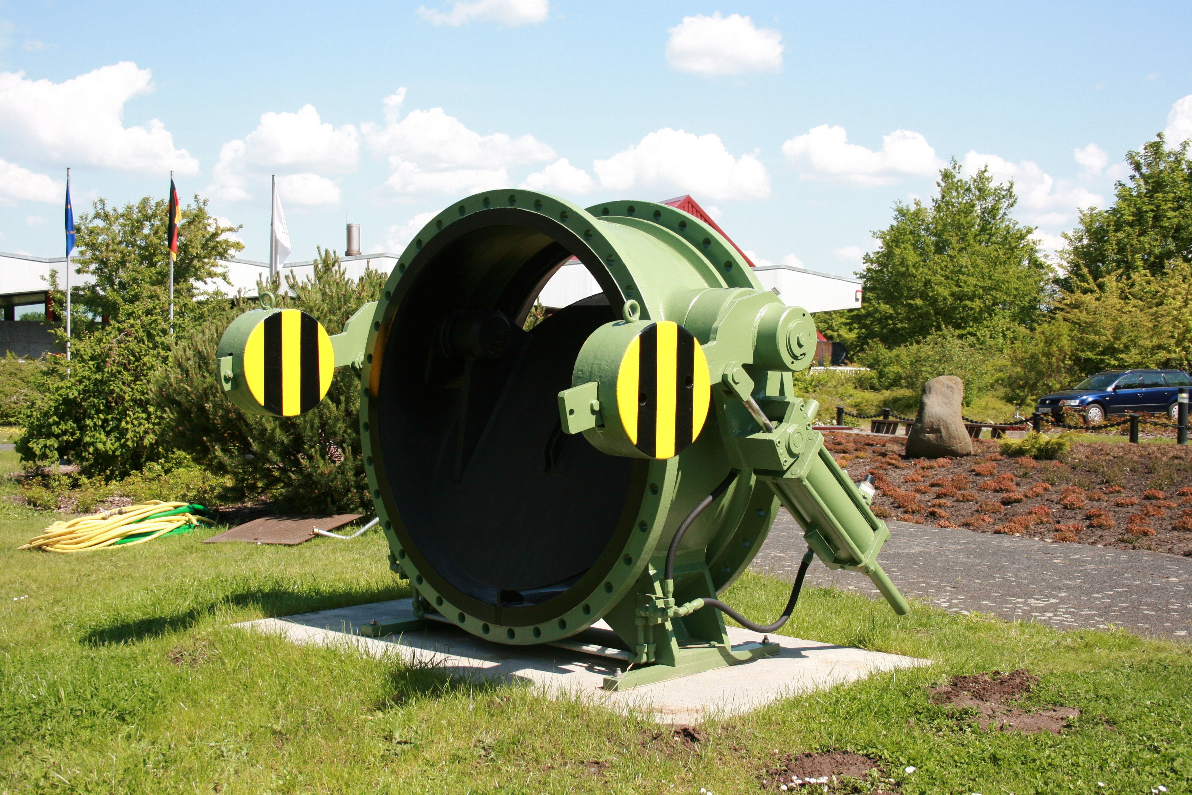 Park am Schiffshebewerk Scharnebeck